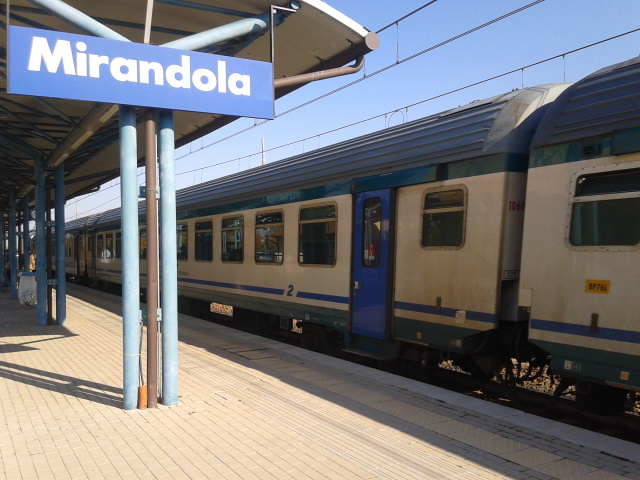 Treno regionale fermo presso il binario 2 della stazione di Mirandola